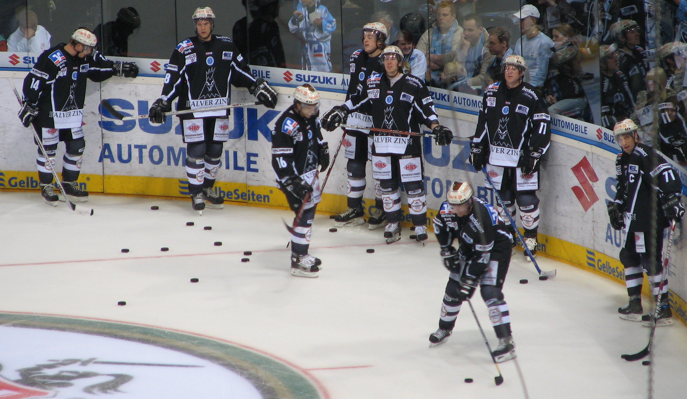 Iserlohn Roosters in Hamburg (Color Line Arena)